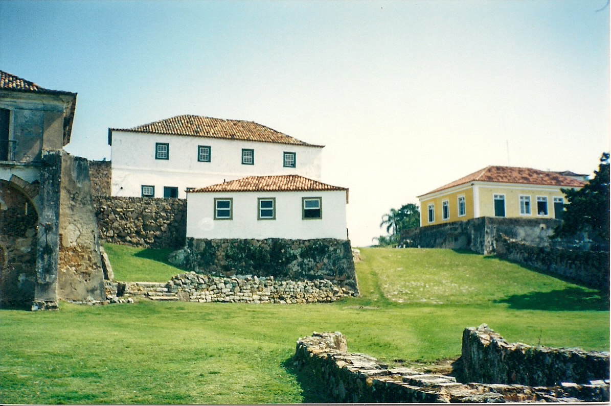 Fortaleza de Santa Cruz de Anhatomirim, Ilha de Anhatomirim, SC, Brasil: vista do interior com destaque para a Casa da Farinha.